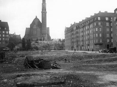 Stockholms borgarskola byggdes 1928-1931. Hösten 1931 flyttade skolan till nybyggda lokaler på Kungstensgatan 2-8 vid Jarlaplan på Östermalm i centrala Stockholm. I bakgrunden syns Engelbrektskyrkan på Karlavägen.